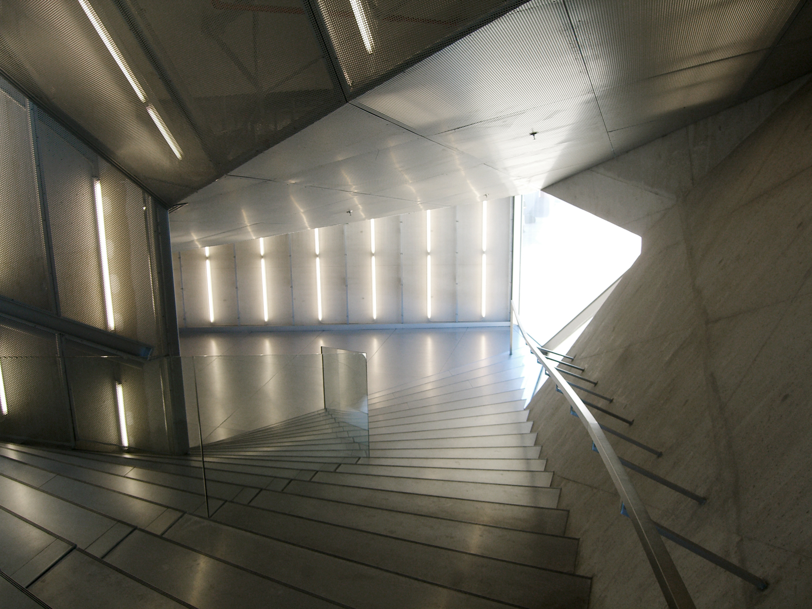 casa da musica, porto, concert building